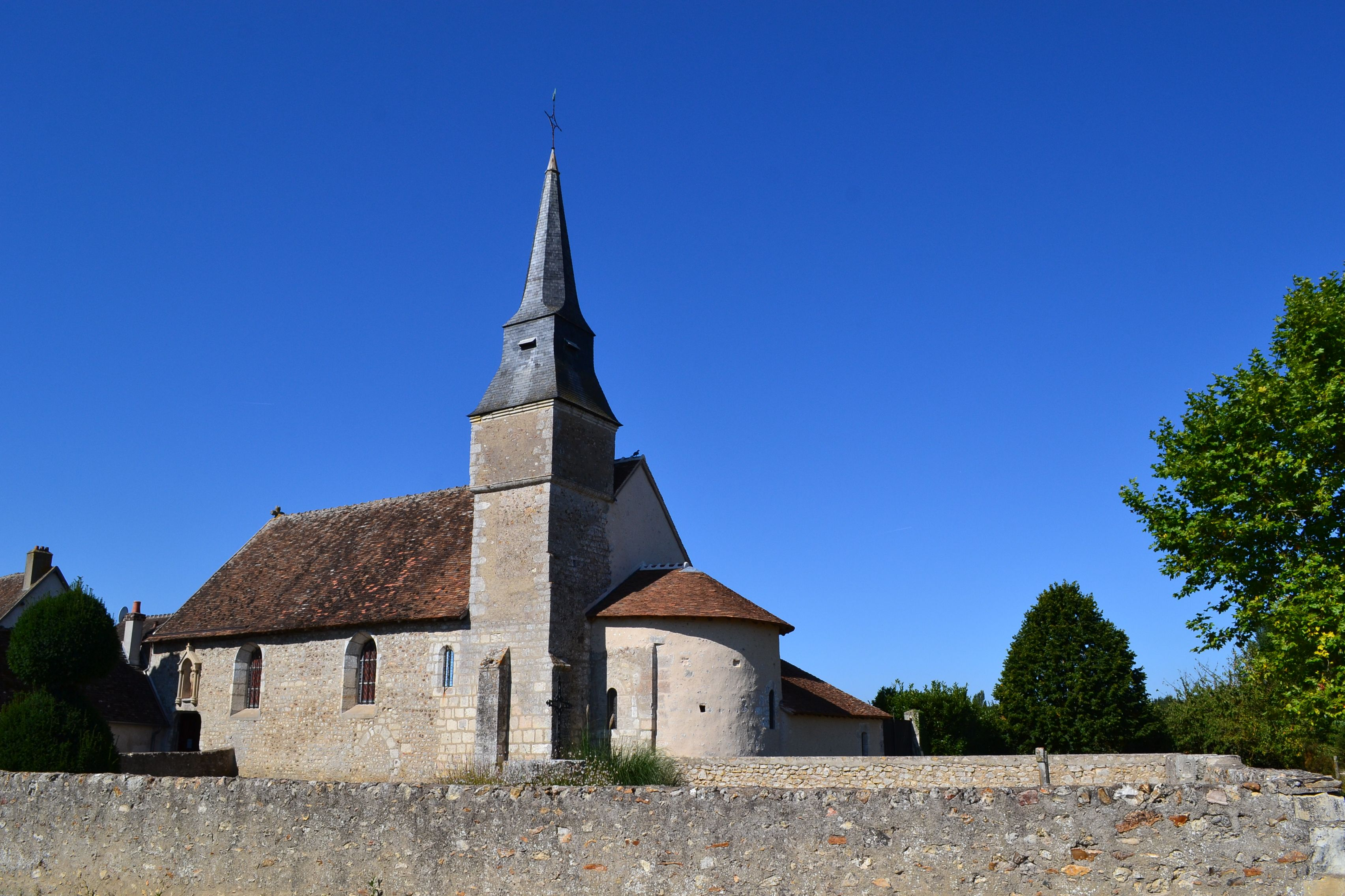 L'église Notre-Dame d'Areines (Loir-et-Cher, France) se compose d'une nef rectangulaire couverte en charpente, d'une courte travée de chœur voûtée en berceau et d'une abside en cul de four, pouvant remonter au XIe siècle. Des remaniements ont été réalisés au XVe siècle. Le clocher a dû être ajouté au XIIe siècle, en même temps que la reprise des murs de l'abside. Le haut du clocher date sans doute du XIVe ou du XVe siècle. Le dernier étage présente un léger encorbellement. À l'intérieur, chœur et abside sont couverts de peintures du XIIe siècle. .